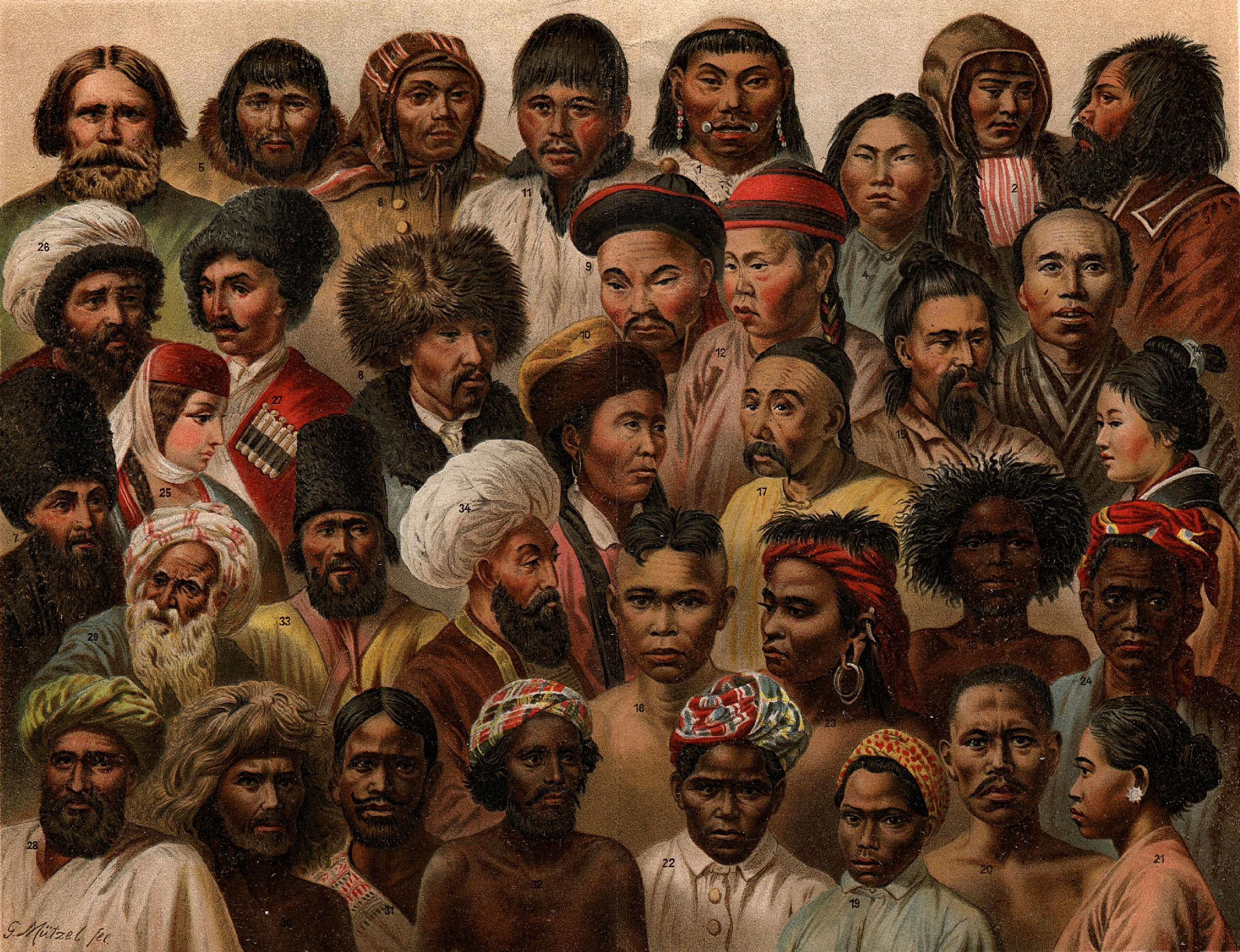 Asiatiska folk 1. Tsjuktsjer. (Chukchi people) 2. Kamtsjadal. (Itelmens or Kamchadal) 3. Aino. (Ainu people) 4. Giljakiska. (Nivkh people or Gilyak) 5. Samojed. (Samoyedic peoples) 6. Ostjak. (Ostyak peoples) 7. Tatar. (Tatars) 8. Kirgis. (Kyrgyz people) 9. Burjät. (Buryats) 10. Kalmuckiska. (Kalmyk people) 11. Tungus. (Tungusic peoples) 12. Golder. (Nanai people, formerly known as Golds or Samagir) 13, 14. Japan och japanska. (Japanese people or Yamato people) 15. Korean. (Koreans) 16. Lao. (Lao people) 17. Kines. (Chinese people) 18. Negrito. (Negrito peoples) 19. Bataviska. (Betawi people, named after Batavia, Dutch East Indies) 20. Javan. (Javanese people) 21. Sundanska. (Sundanese people) 22. Bata (Sumatra). (Batak people) 23. Dajak (Borneo). (Dayak people) 24. Inföding på Celebes. (Indigenous people of Sulawesi or Celebes) 25. Georgiska. (Georgian people) 26. Tsjerkess. (Adyghe people or Circassians) 27. Kabardin. (Kabarday or Kabardin people) 28. Arab. (Arab people) 29. Jude. (Jews) 30. Vedda (på Ceylon). (Vedda people) 31. Singales. (Sinhalese people) 32. Indier. (Indian people) 33. Perser. (Persian people) 34. Belutsjer. (Baloch people) 35. Kosack. (Cossacks)